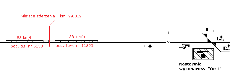 1980-08-19 04:30 czołowe zderzenie pociągu osobowego nr 5130 z pociągiem towarowym nr 11599 pod Otłoczynem. Linia kolejowa nr 18 Kutno - Piła Główna, km 99,312.